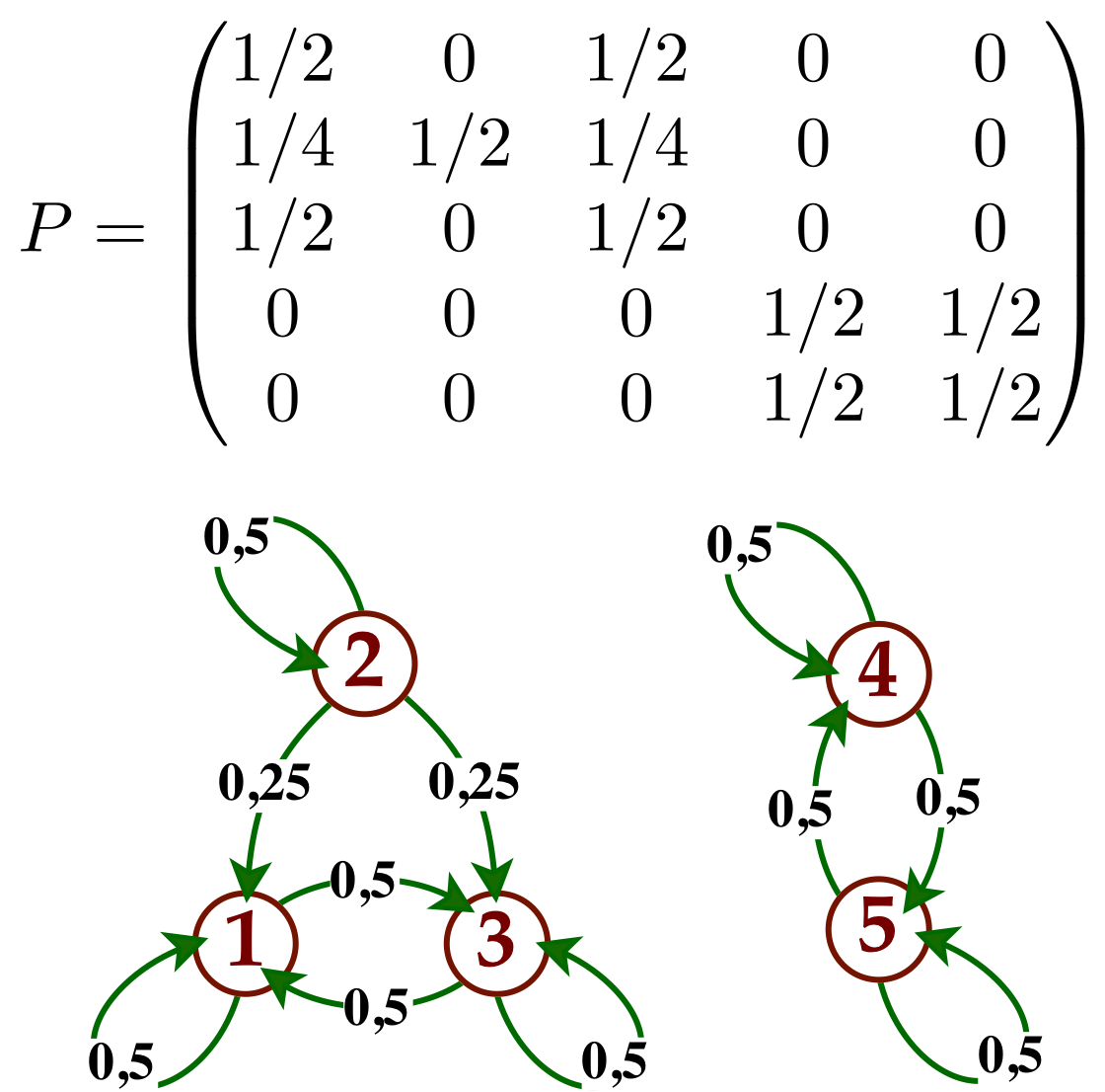 Graphe d'une chaîne de Markov non irréductible à espace d'états fini, possèdant 3 classes : {1,3}, {2} et {4,5}.